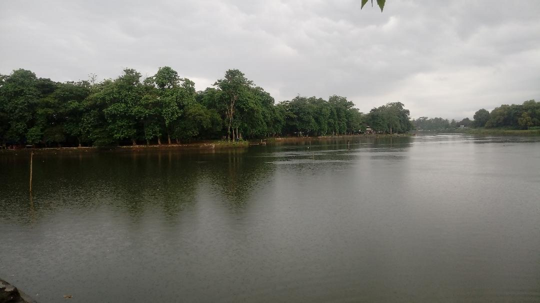 Situ Cikaret di sore hari